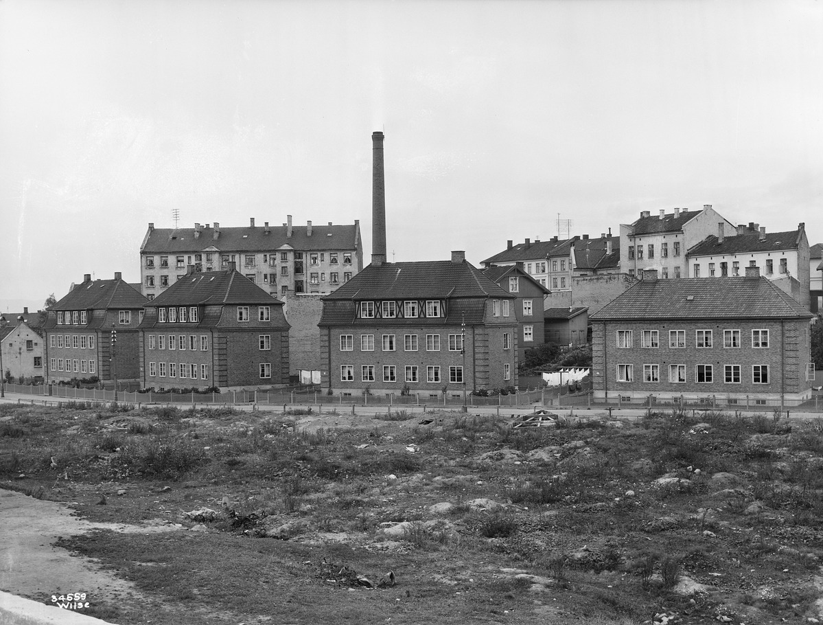 Jordalgata, med Botsfengselets funksjonærboliger (nr. 4-10).